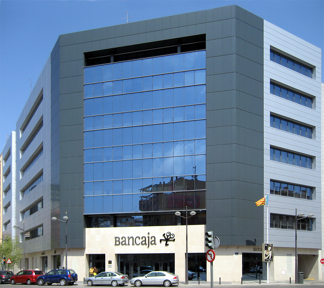 Bancaja building